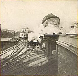 Gare du Champ de Mars et Globe célèste de l'exposition universelle (1900), Paris.